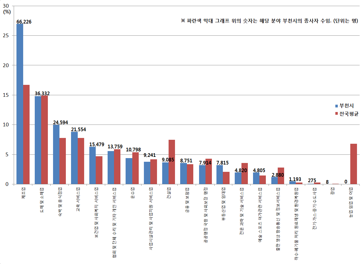 부천시 종사자별 산업구조